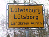 Zweisprachige Ortstafel von Luetetsburg